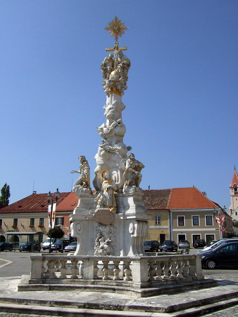 Eggenburg, barocke Pestsäule